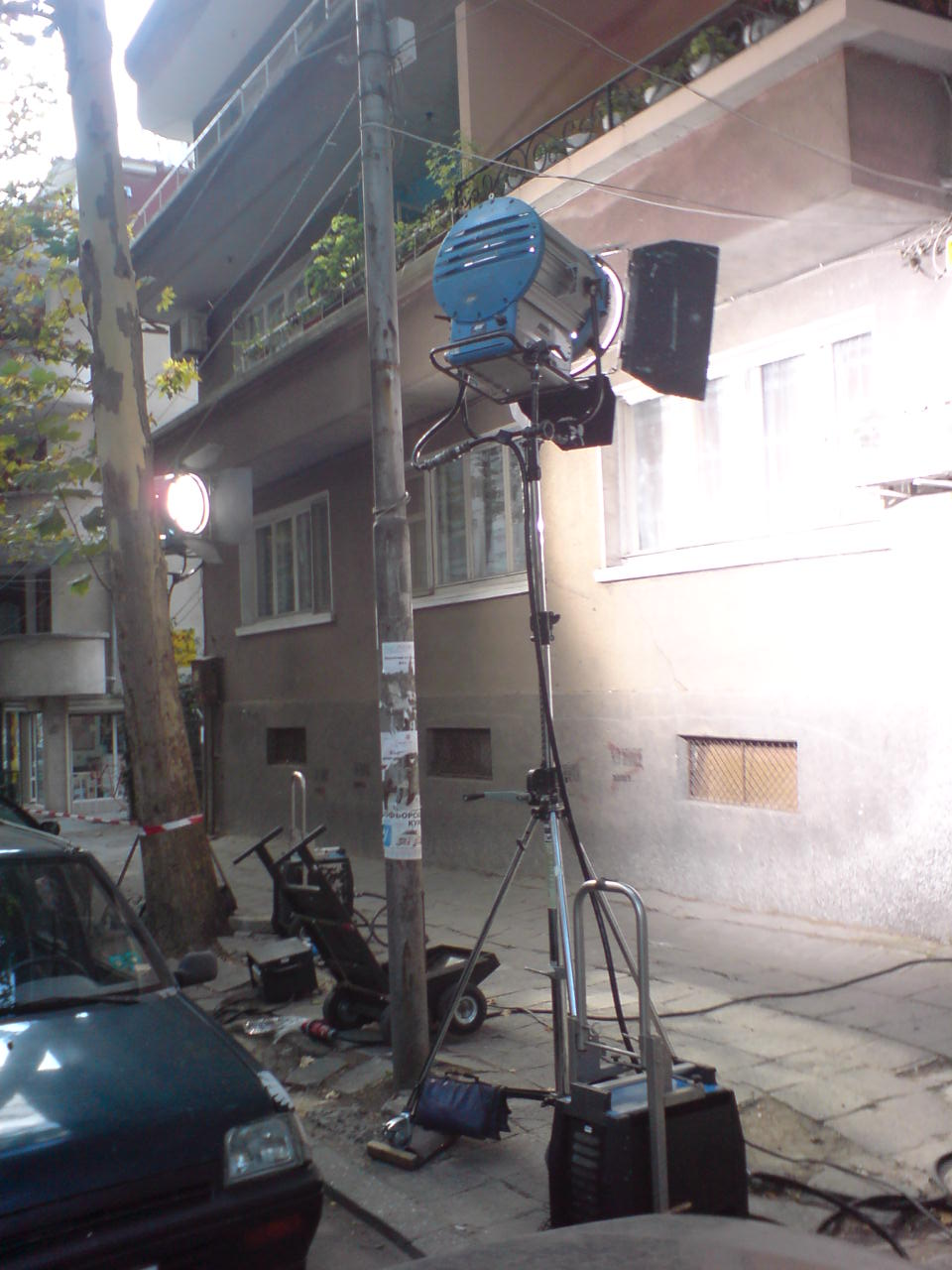 Burgas, Bulgarien: Sv. Sv. Kiril i Metodi-Straße während der Dreharbeiten zum Film The Island von Kamen Kalew